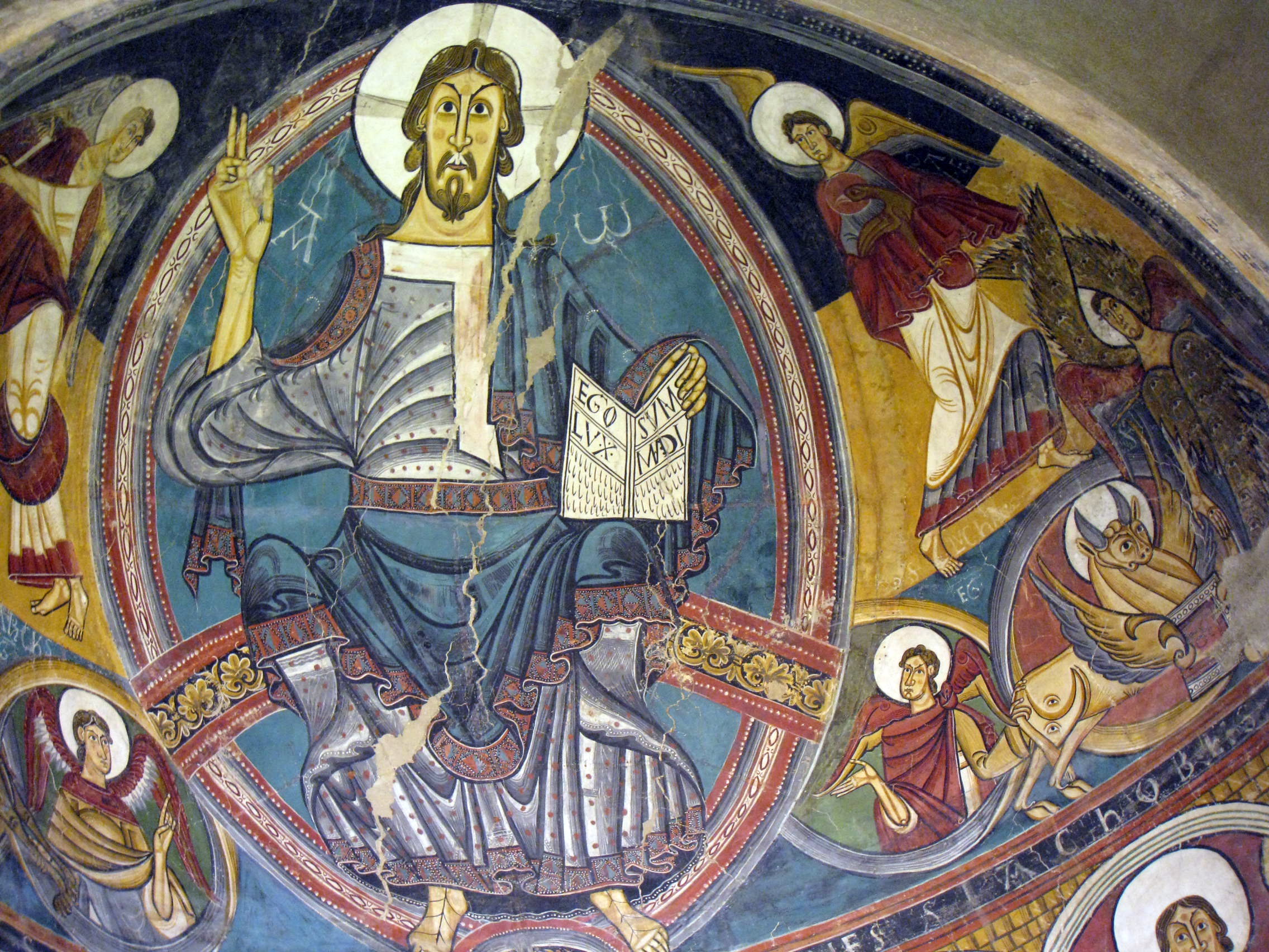 Palau Nacional (Barcelona)